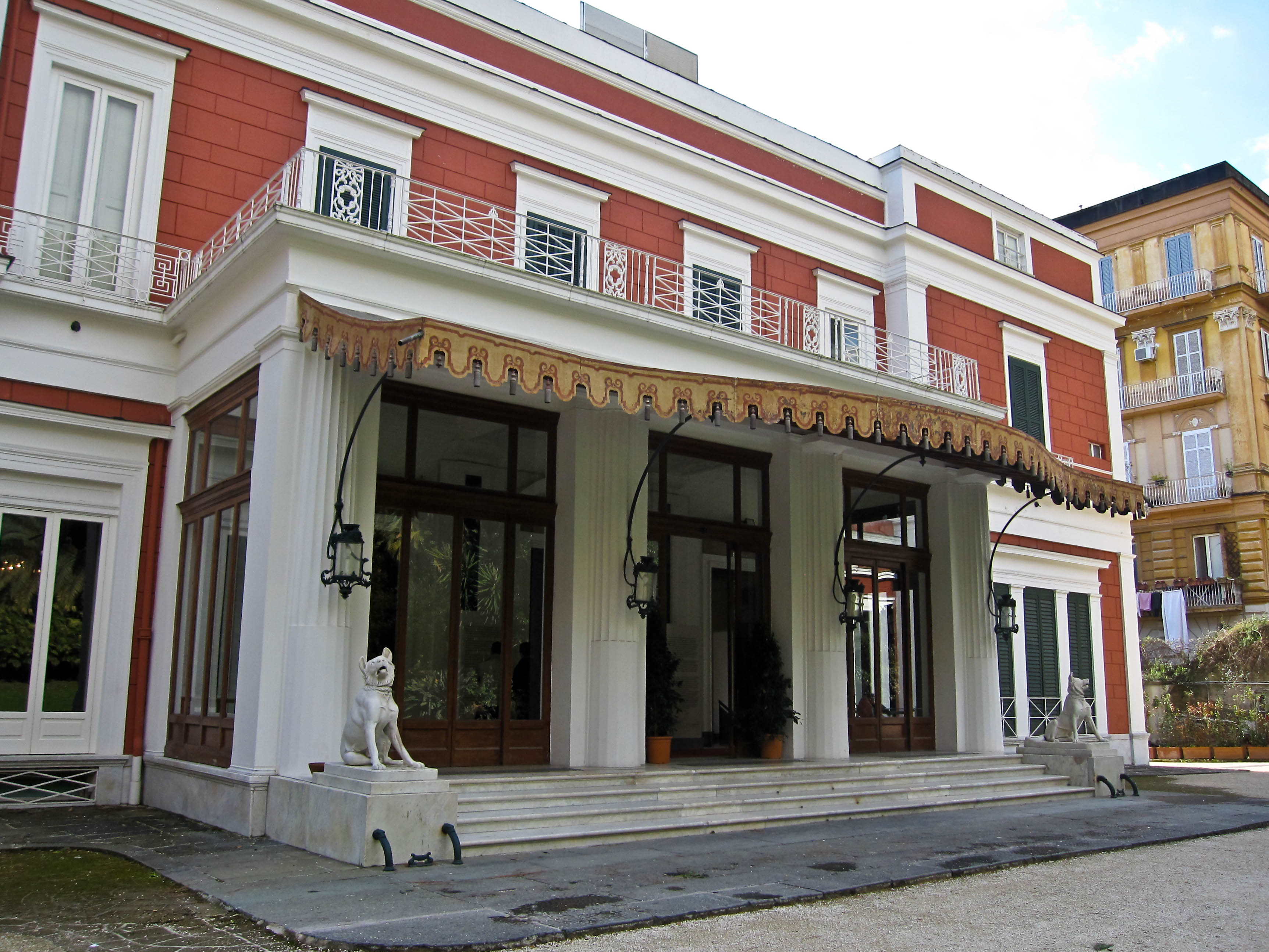 Esterno sul retro della Villa Pignatelli - Napoli